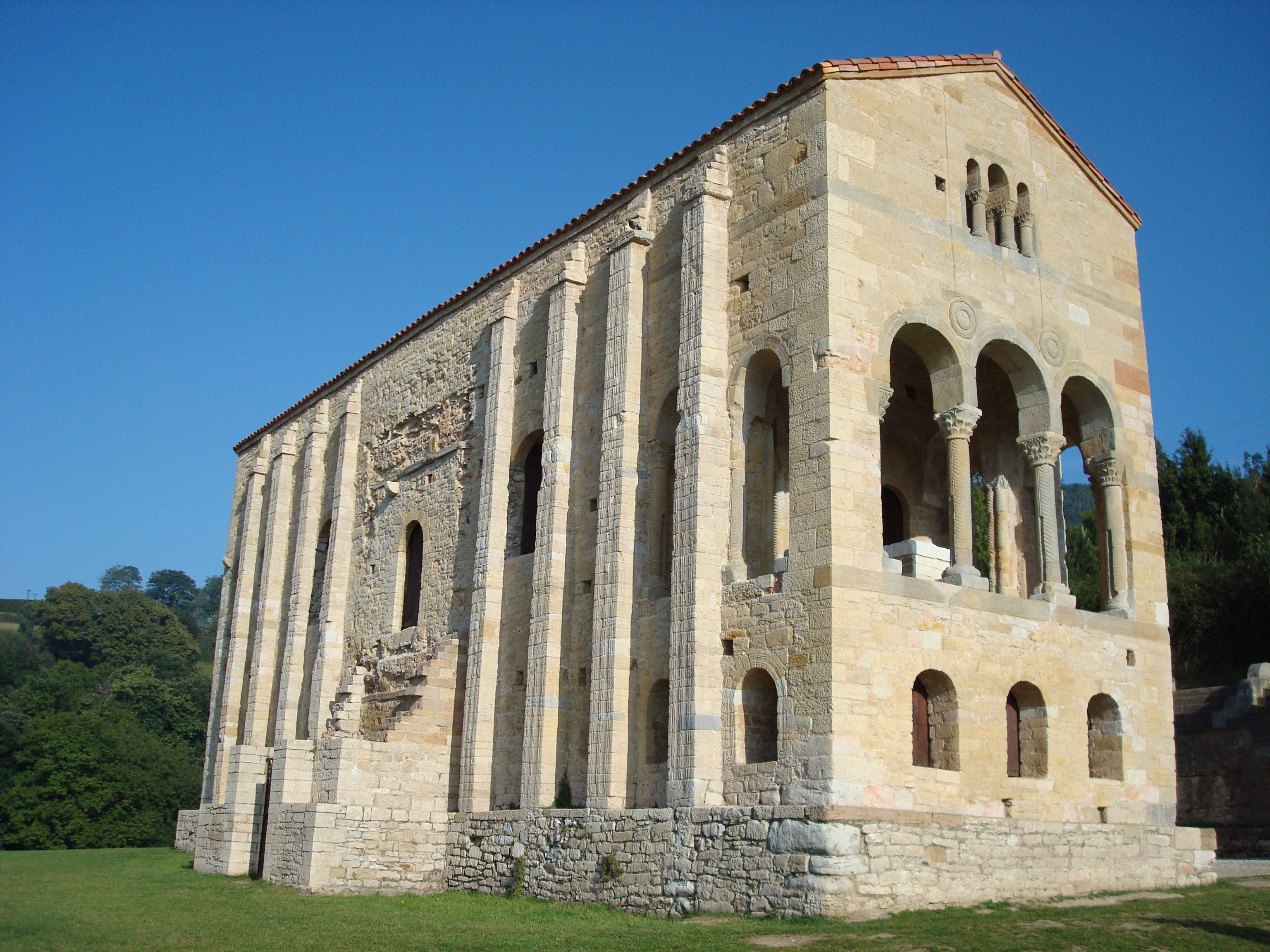 Iglesia de Santa Maria del Naranco (Oviedo) - 002